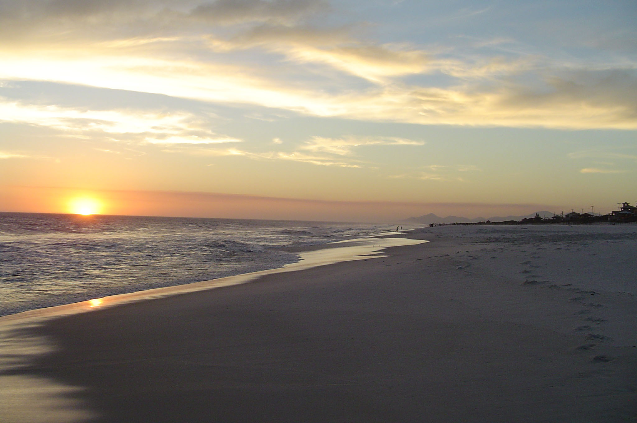 Praia Seca - Araruama - RJ, Brazil